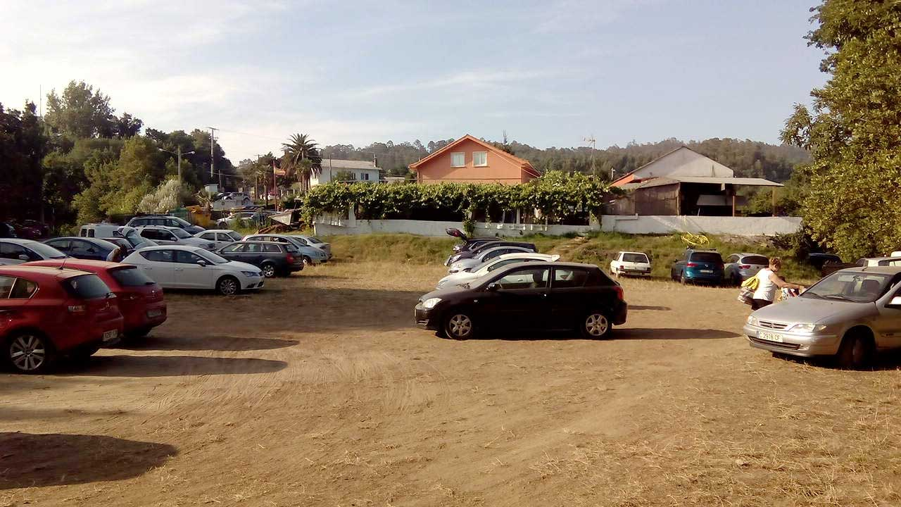 Imaxe do Castro de Río Castro, Fene.